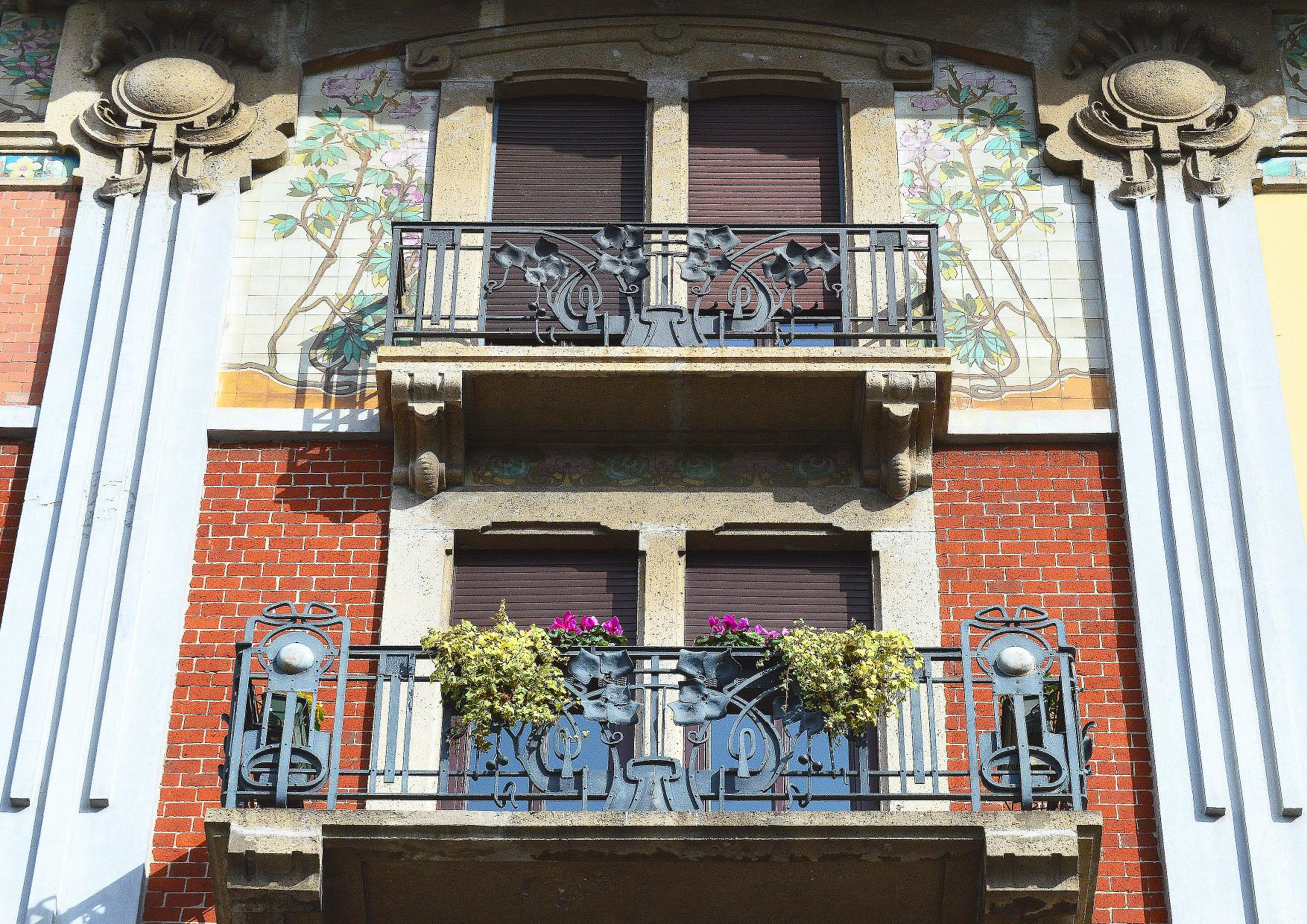 Casa Laugier (stile Liberty), Milano